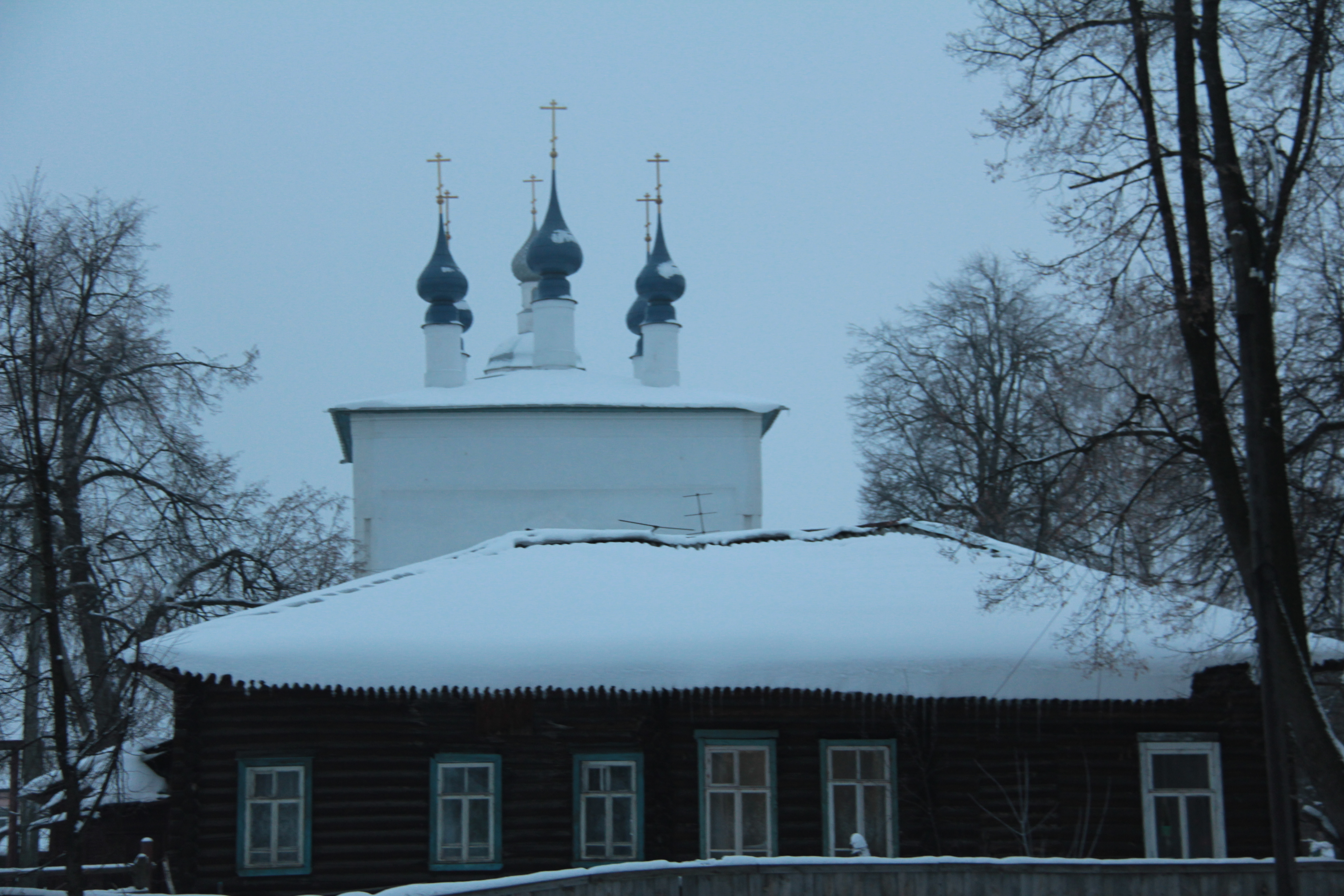 Церковь Покровская (Ивановская область, Шуя, Союзная площадь)